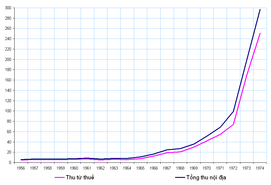 Thu ngân sách từ nguồn nội địa của chính quyền Việt Nam Cộng hòa thời kỳ 1956-1974 (Đơn vị: tỷ đồng) Dựa theo số liệu từ Douglas C. Dacy (1986), Foreign aid, war, and economic development: South Vietnam, 1955-1975, Cambridge University Press, bảng 11.2, trang 215